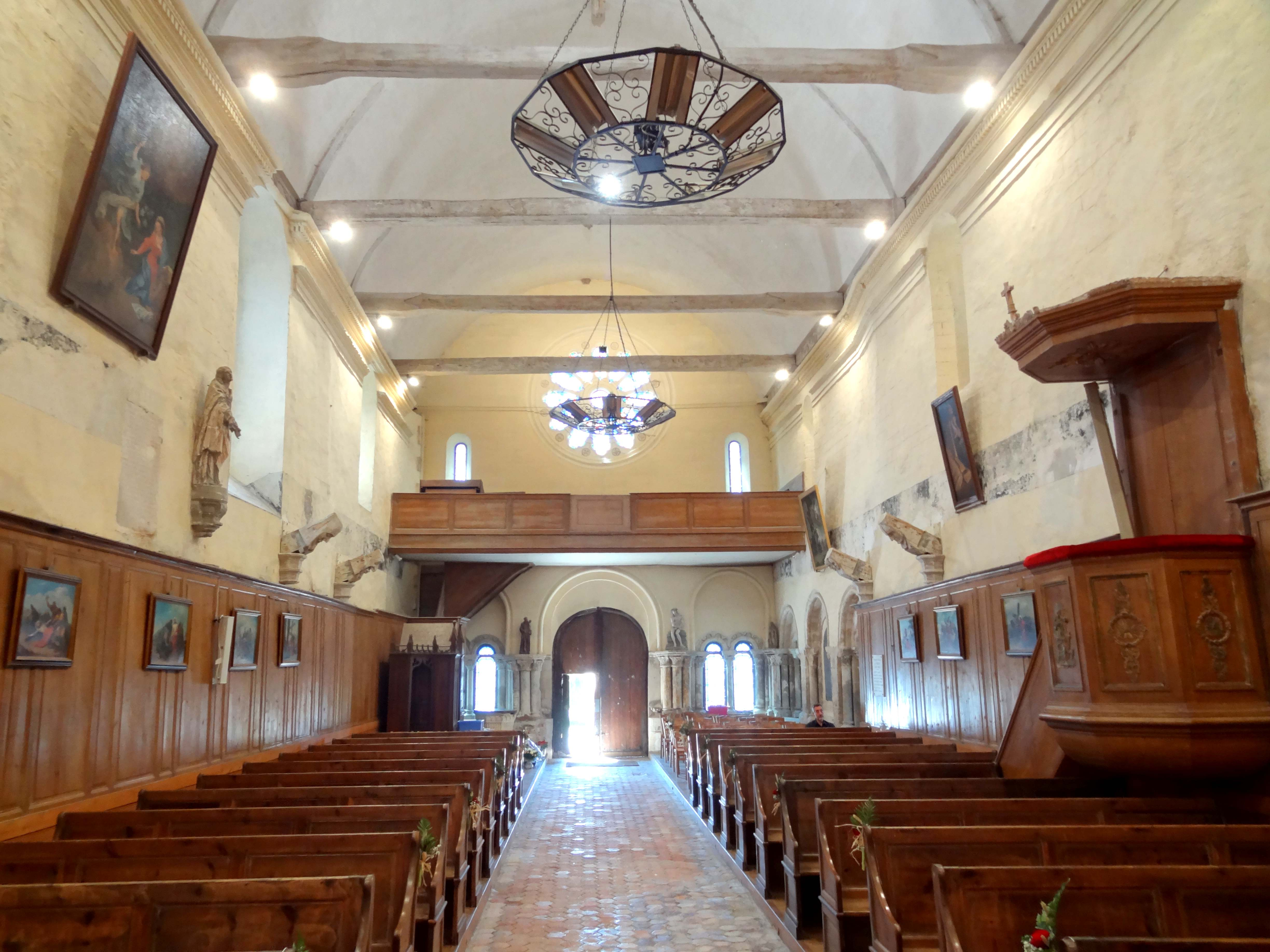 Intérieur de l'église - voir titre.